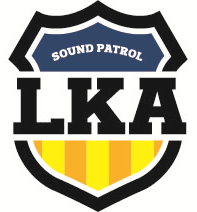 Das Redisign des LKA Logos von 2012. Das Logo besteht in seiner Urform seit der Firmengründung und erhielt im Juni 2012 ein Redesign.